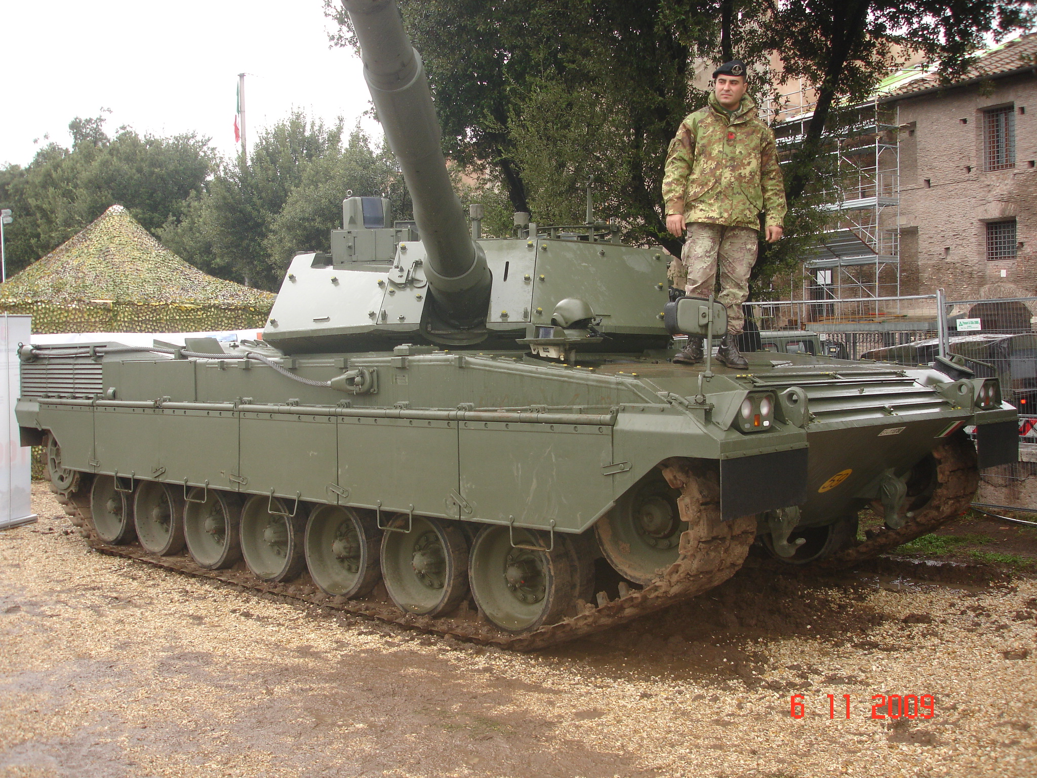 carro Ariete esposto a Roma.